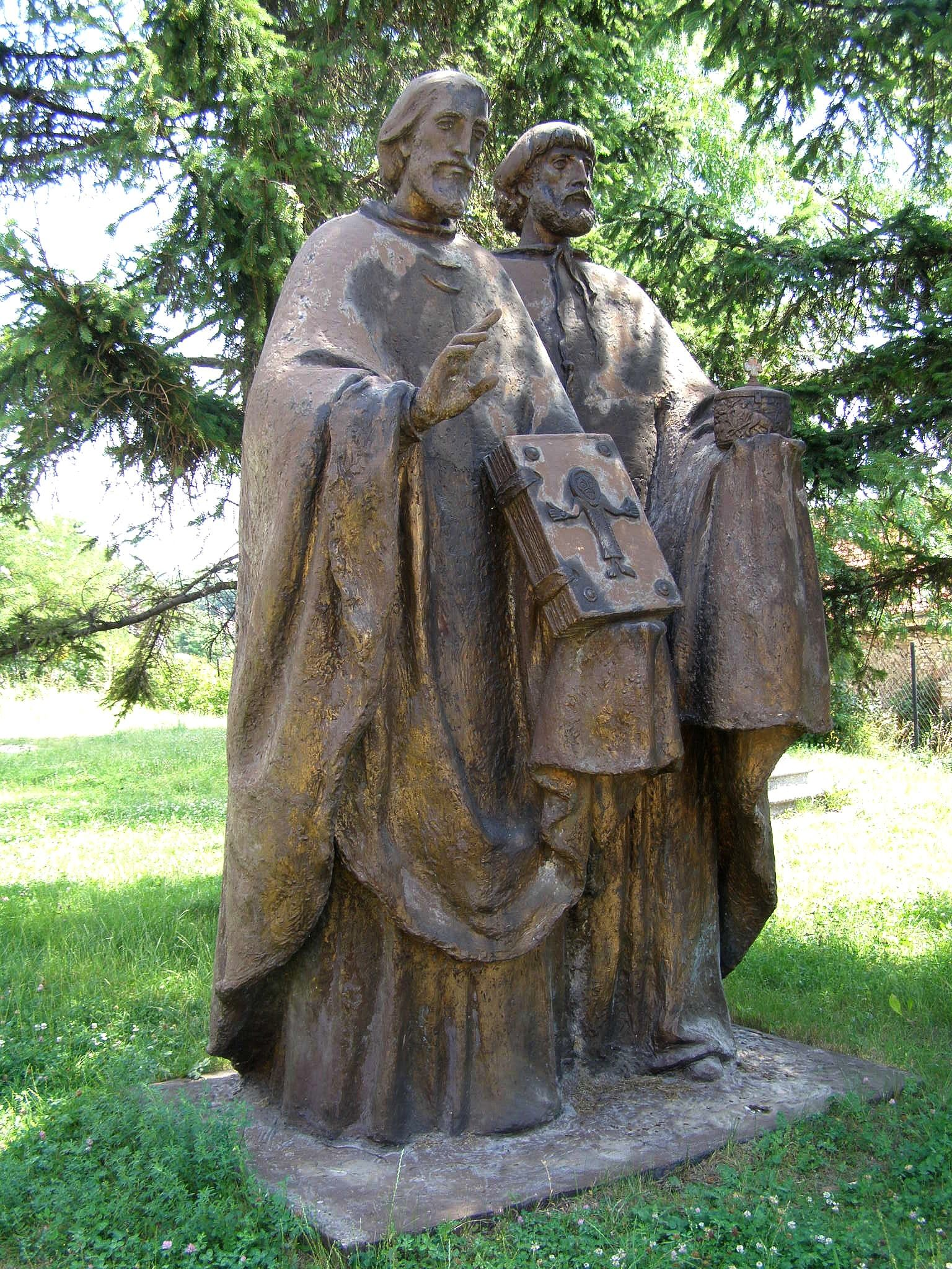 Epoxidové súsošie slovanských vierozvestcov sv. Cyrila a sv. Metoda v záhrade kostola